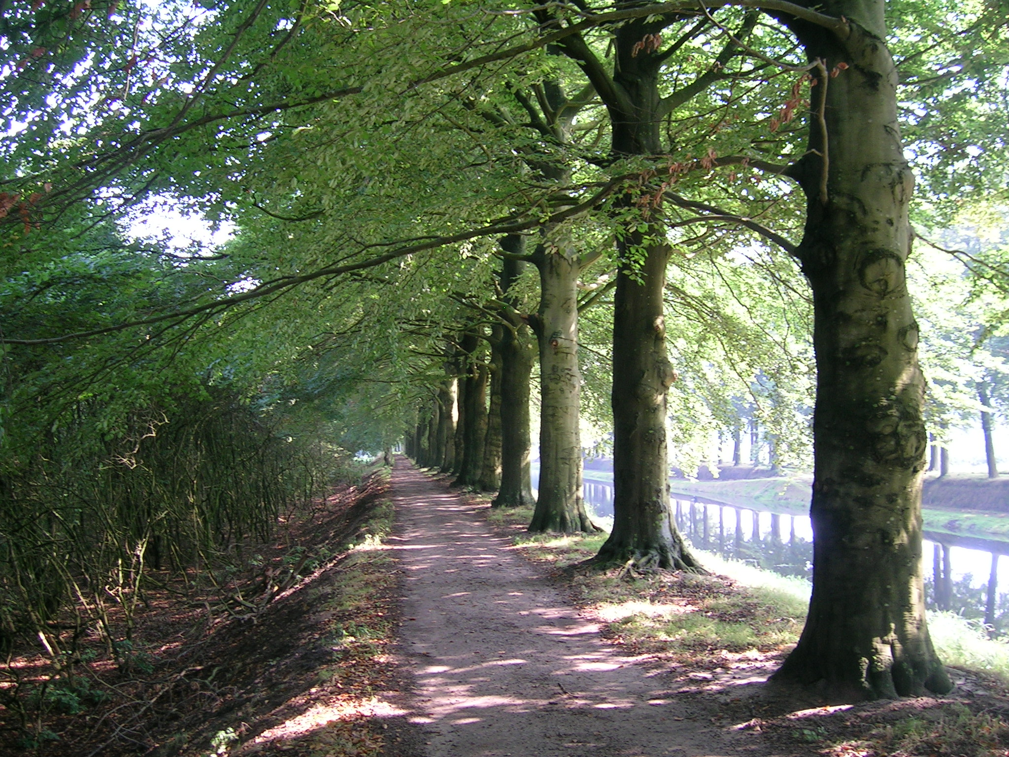 Pieterpad, The Netherlands: between Hellendoorn and Laren